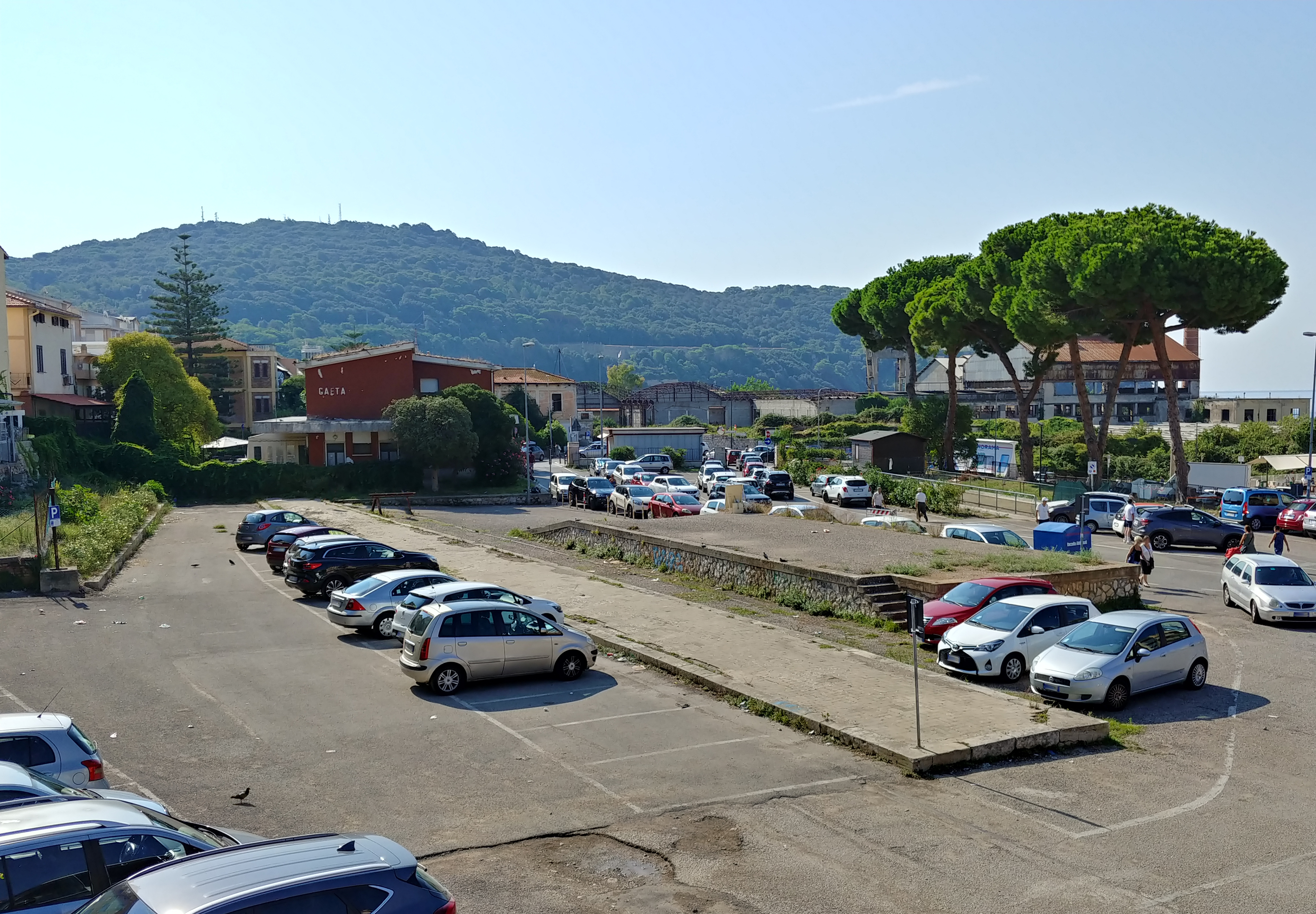 Piazzale Ferrovia visto da corso Cavour.